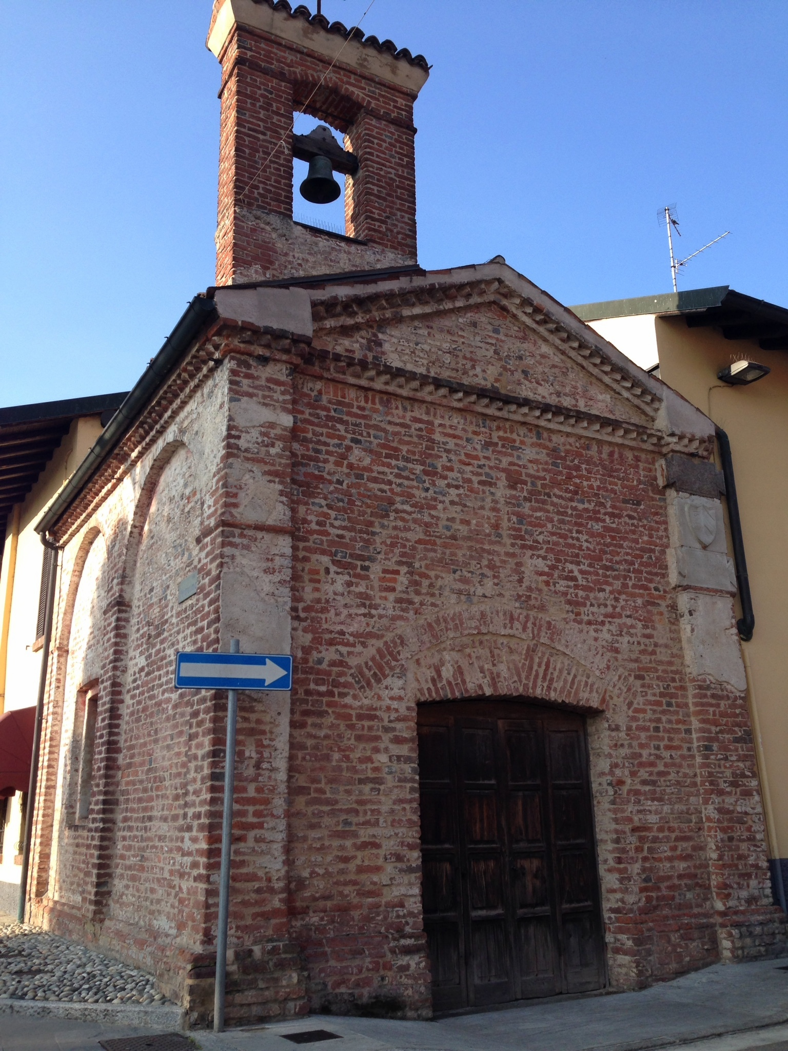 Zelo Surrigone - L'Oratorio di San Galdino